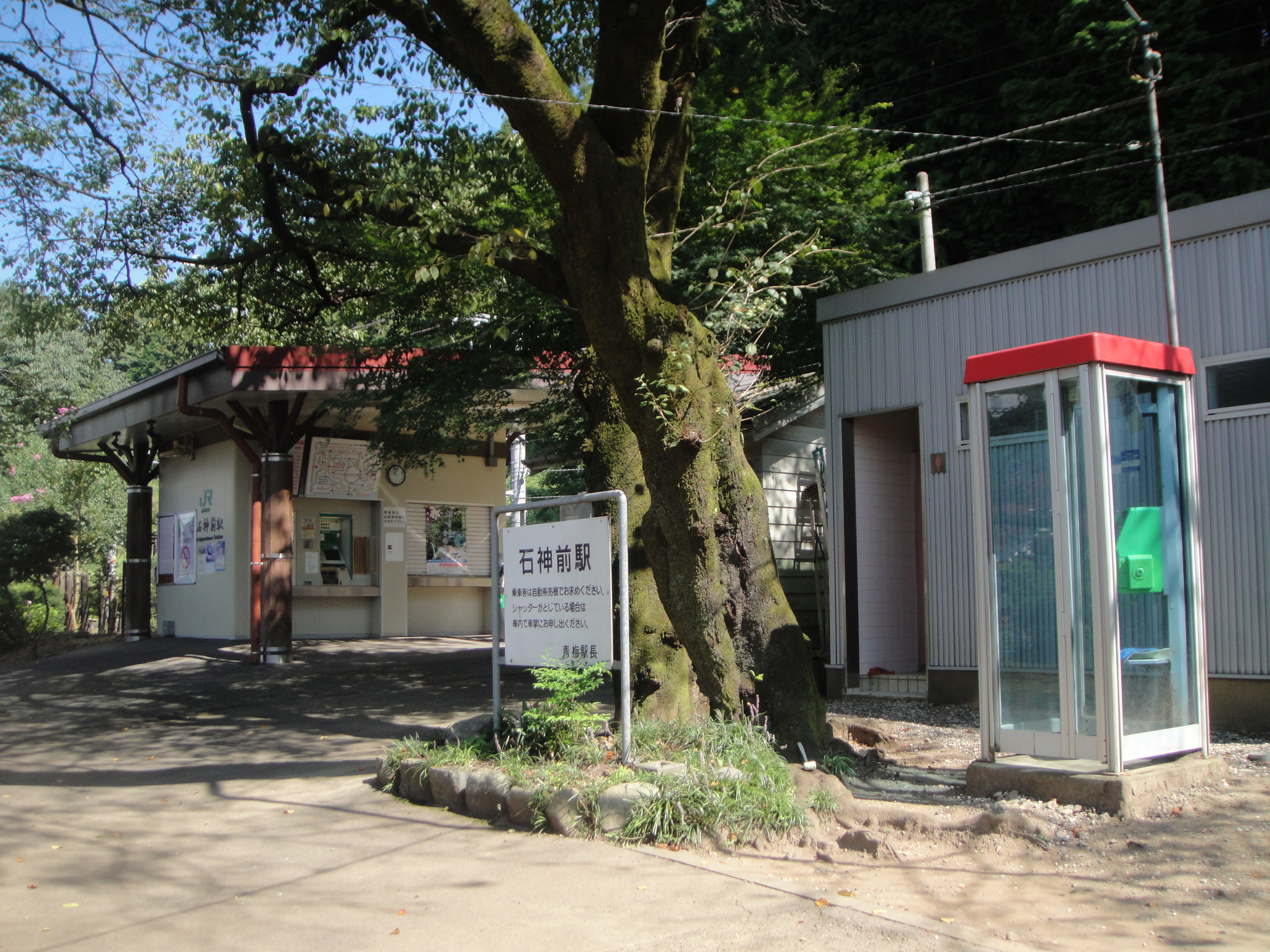 JR青梅線の石神前駅前を撮影